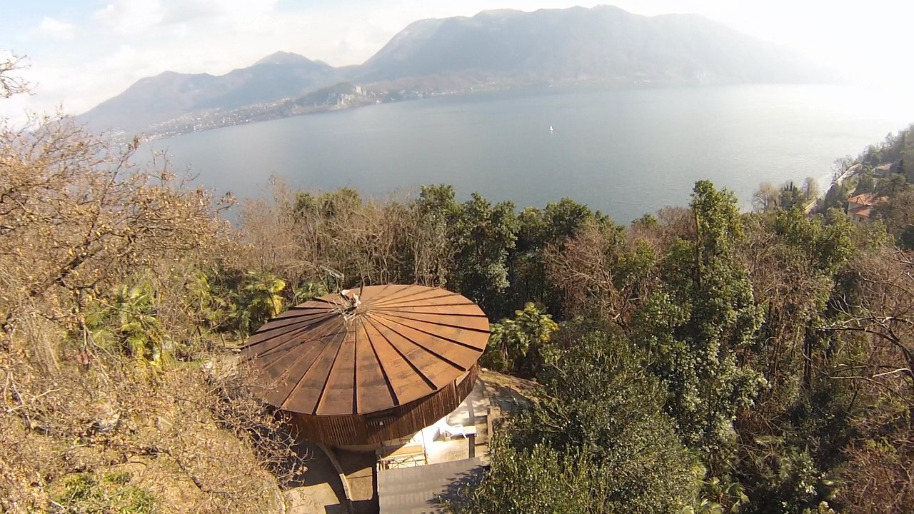 Vista aerea della casa dell'orologiaio di Ghiffa